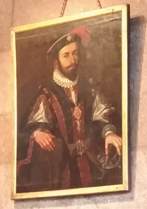 Portrait supposé de Jean III Girard, chevalier, seigneur de Bazoges-en-Pareds, Moricq, etc., panetier de France, conseiller des rois François Ier et Henri II, chevalier de l'Ordre de Saint-Michel (château de la Guignardière)